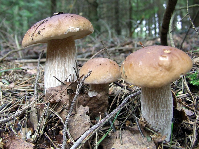 Boletus edulis. Karmėlava forest, Lithuania.